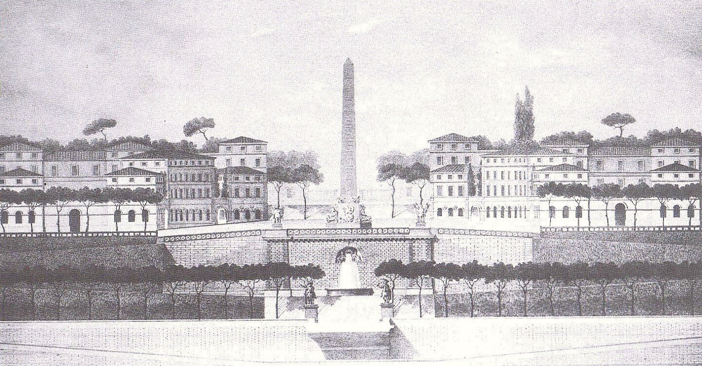 Projet de monument (obélisque) célébrant la prise du Trocadéro par le duc d'Angoulême en 1823 et de caserne pour trois bataillons de la garde royale.